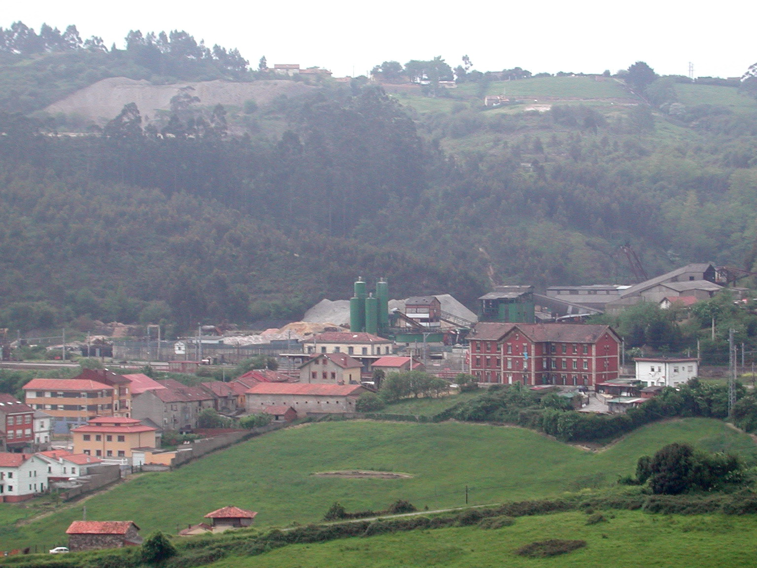 Vista parcial de Villabona